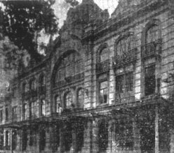 Antigo Cine República (na praça República) na cidade de São Paulo na década de 1920